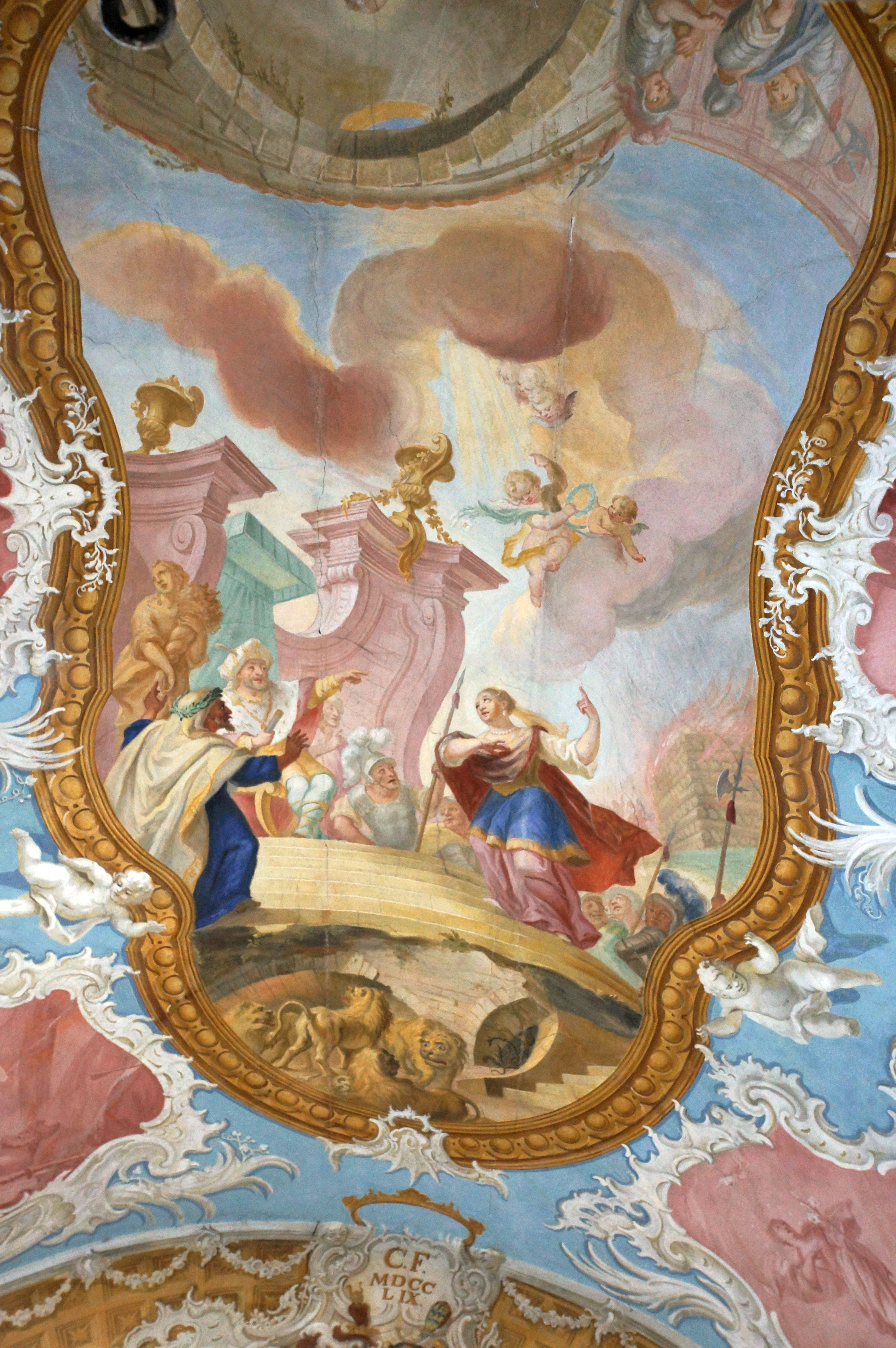 2012-10-06 Landshut 080 Altstadt, Thekla Kapelle